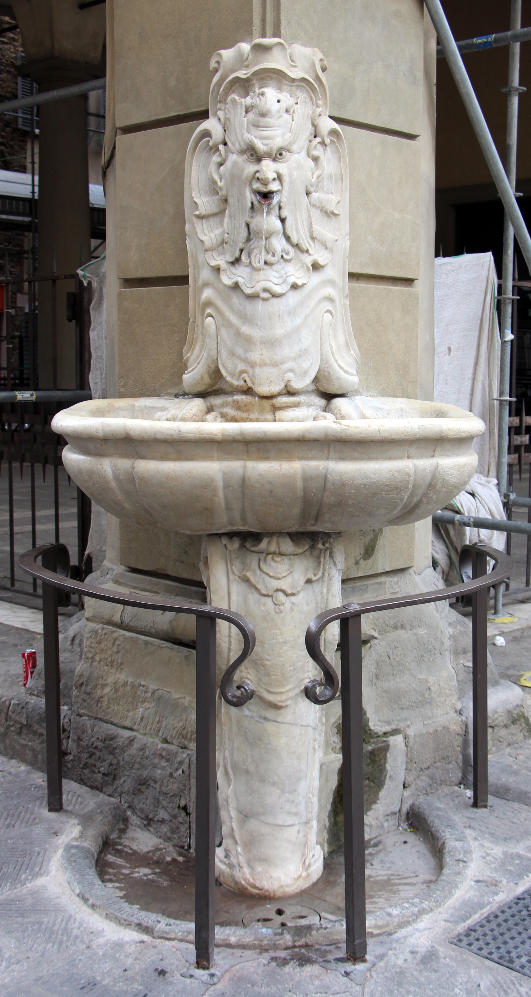 Firenze, vari siti (vedi filename e categorie)